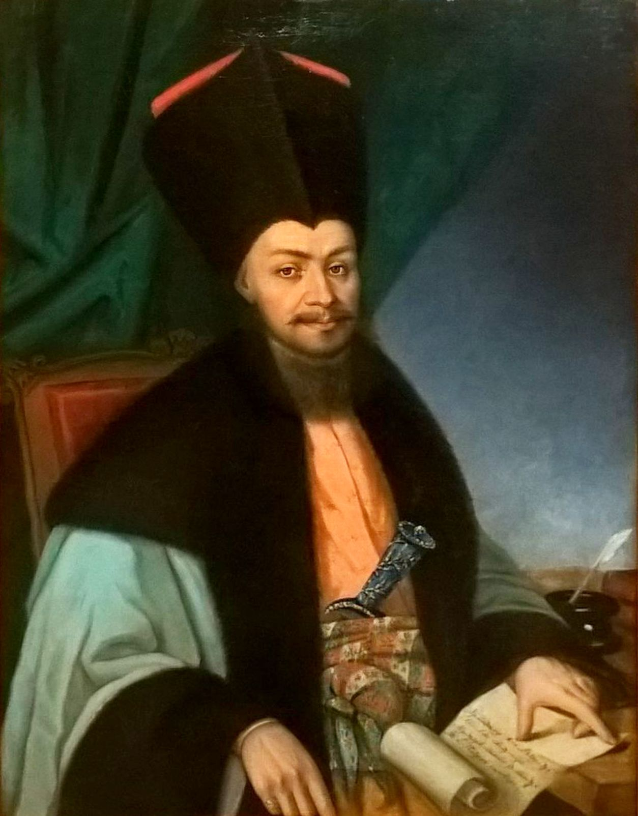 Ienăchiţă Văcărescu